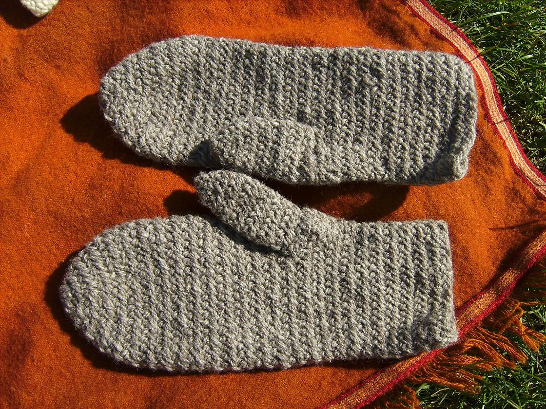 Mitten in "needlebinding"-technique